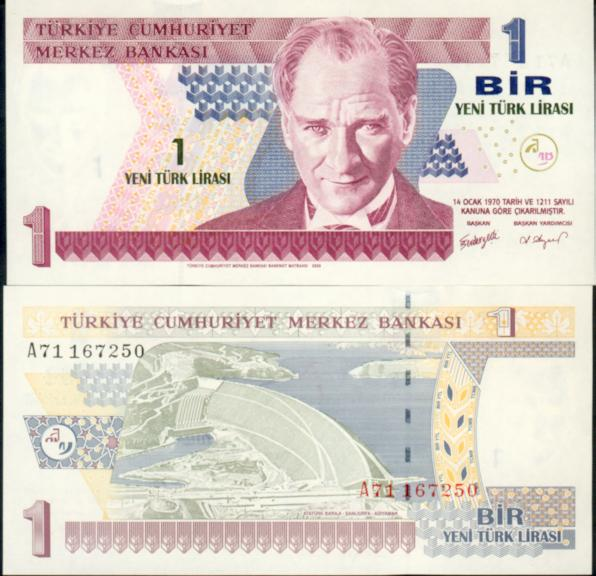 Turcja - 1 lirasi